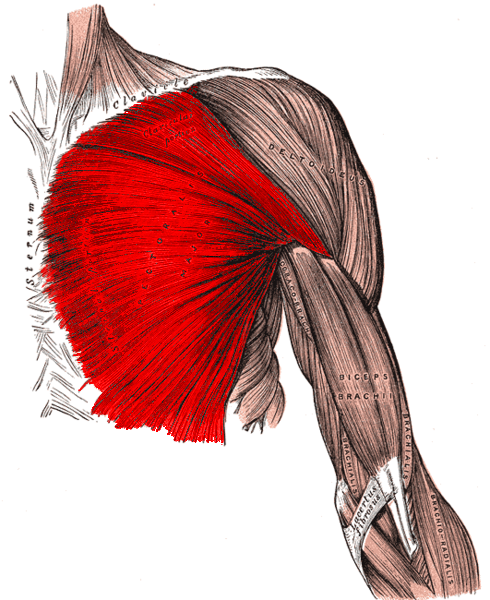 Gray's anatomy